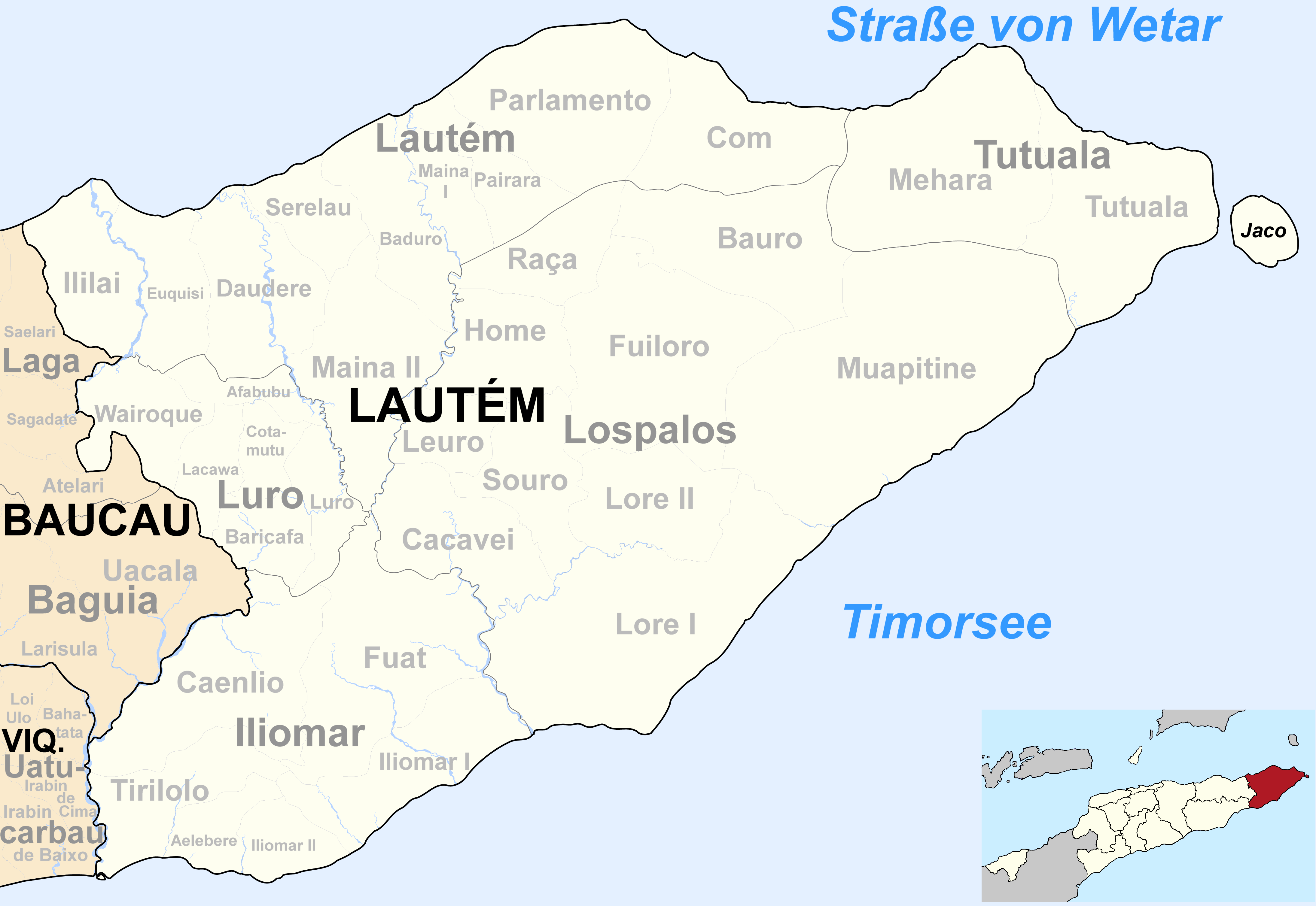 Verwaltungseinheiten der Gemeinde Lautém, Osttimor.